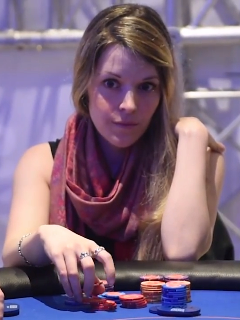 Maria Lamprópulos beim High Roller der 888Live Barcelona